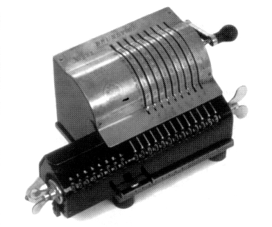 Brunsviga erstes Modell